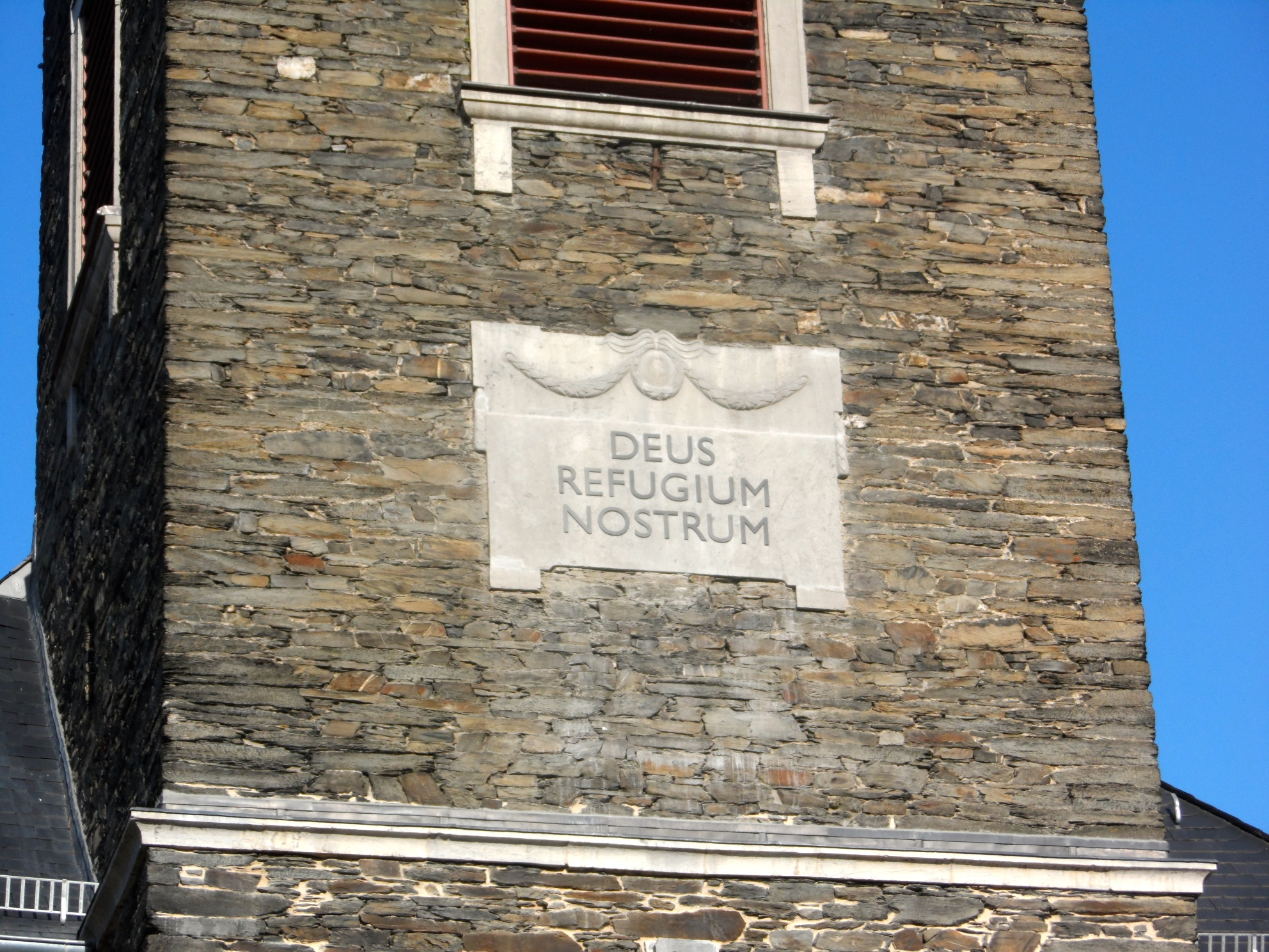 DEUS REFUGIUM MONSCHAU, Psalm 46,2 "Gott ist meine Zuversicht"